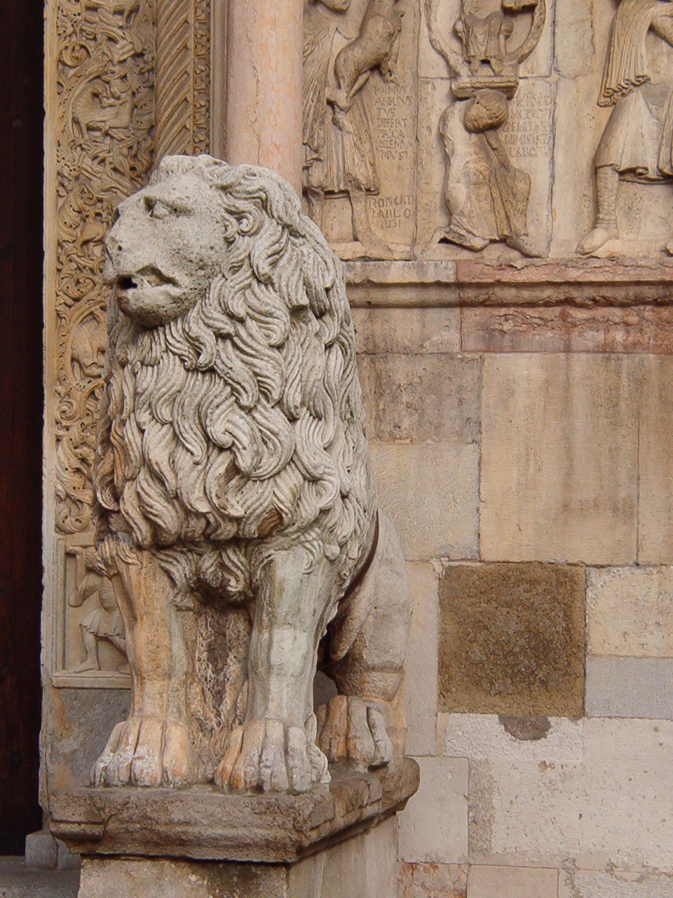 Duomo di modena